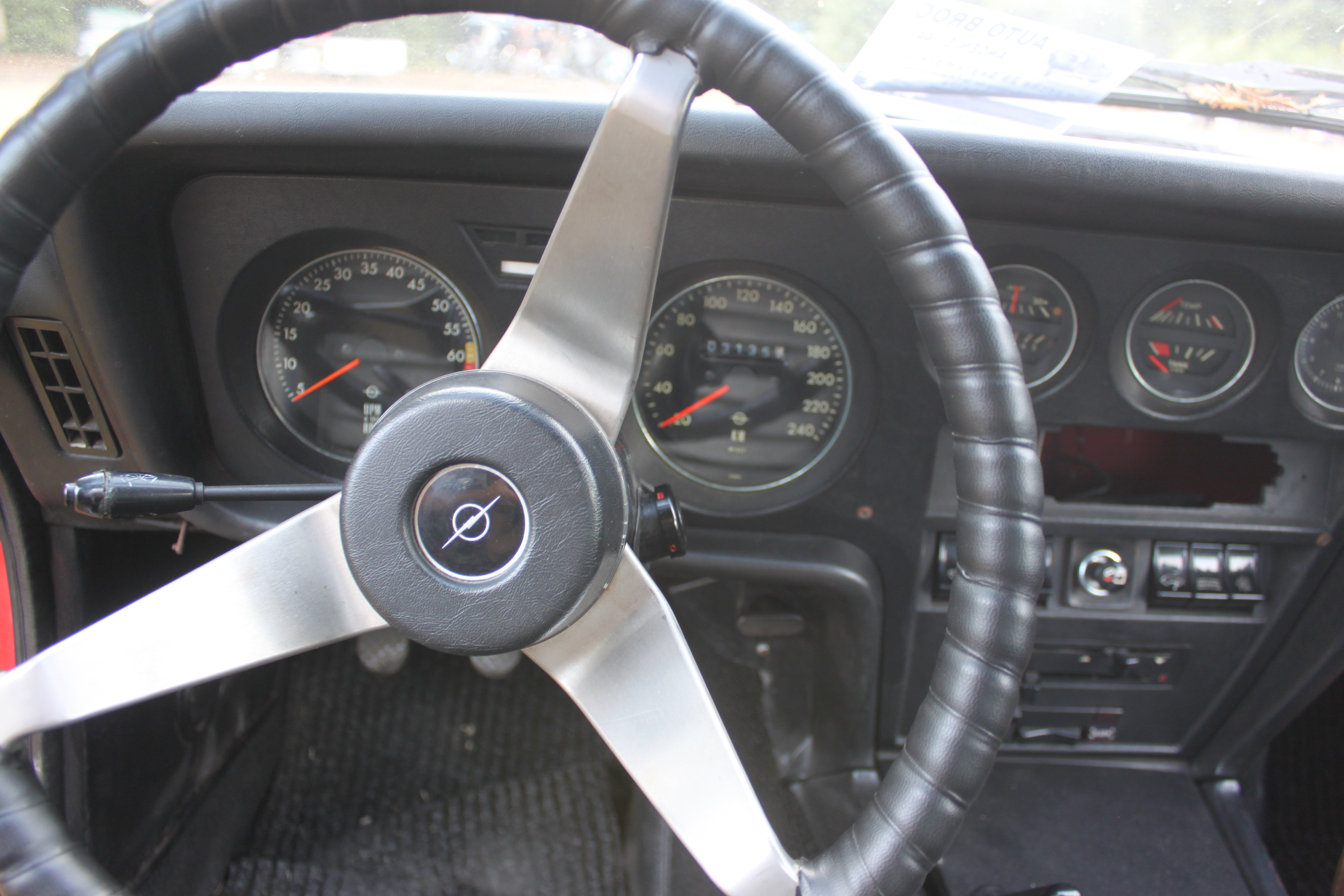 Opel GT.